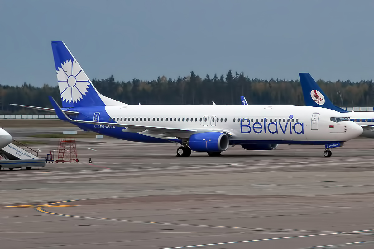 Belavia, EW-456PA, Boeing 737-8ZM